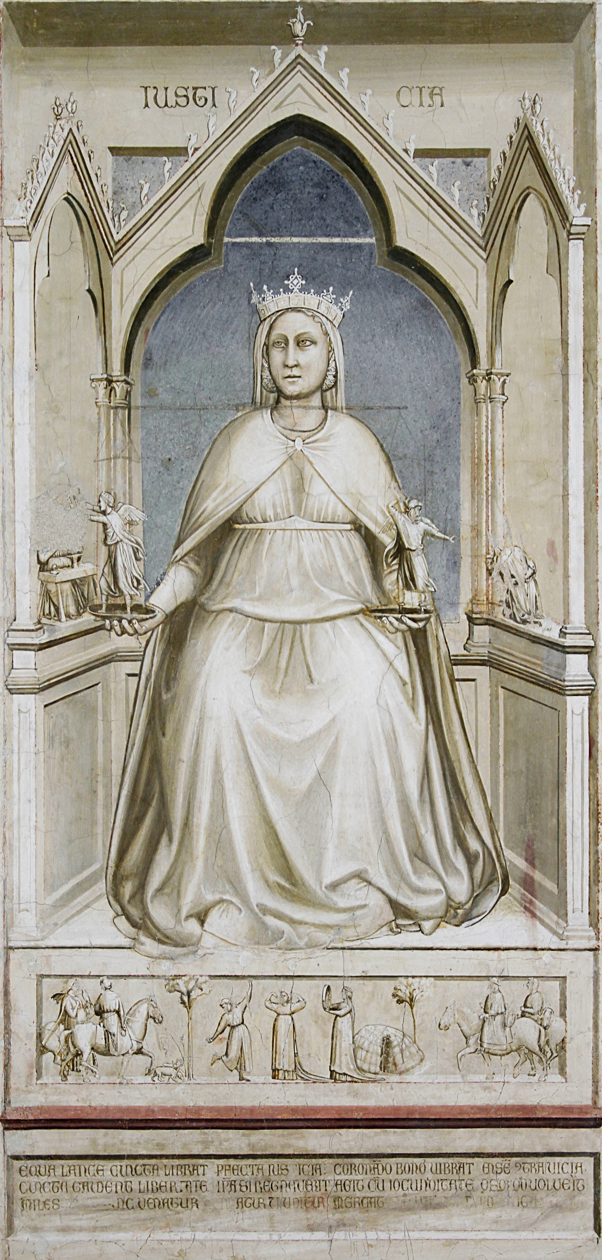 Capella dei Scrovegni - Padua